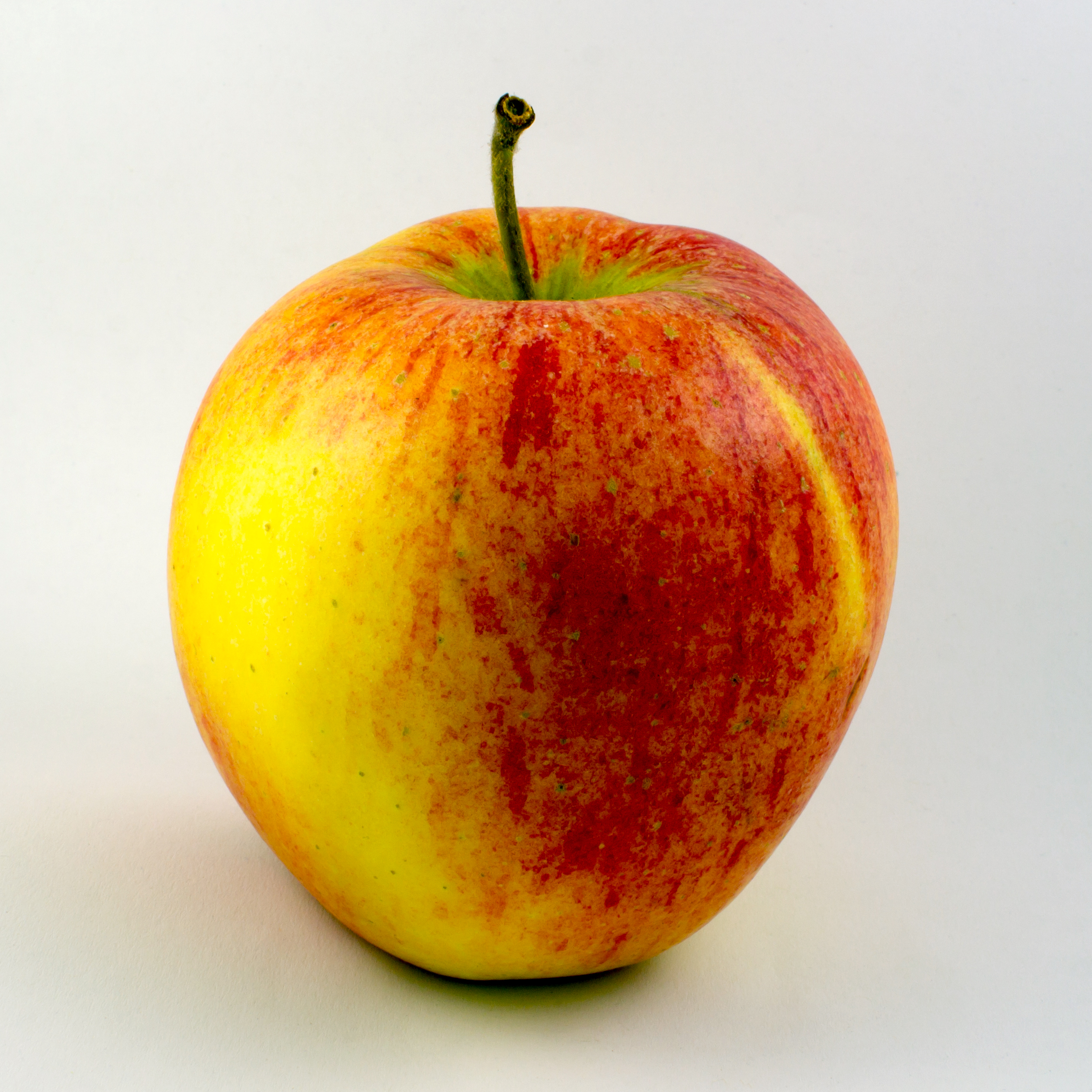 Apfelsorte Pinova